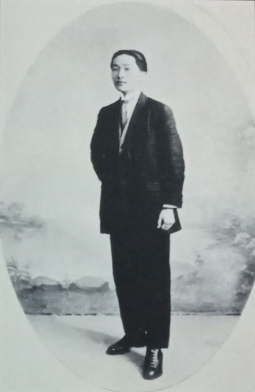 中文（中国大陆）: 大理州博物馆-人像-张伯简